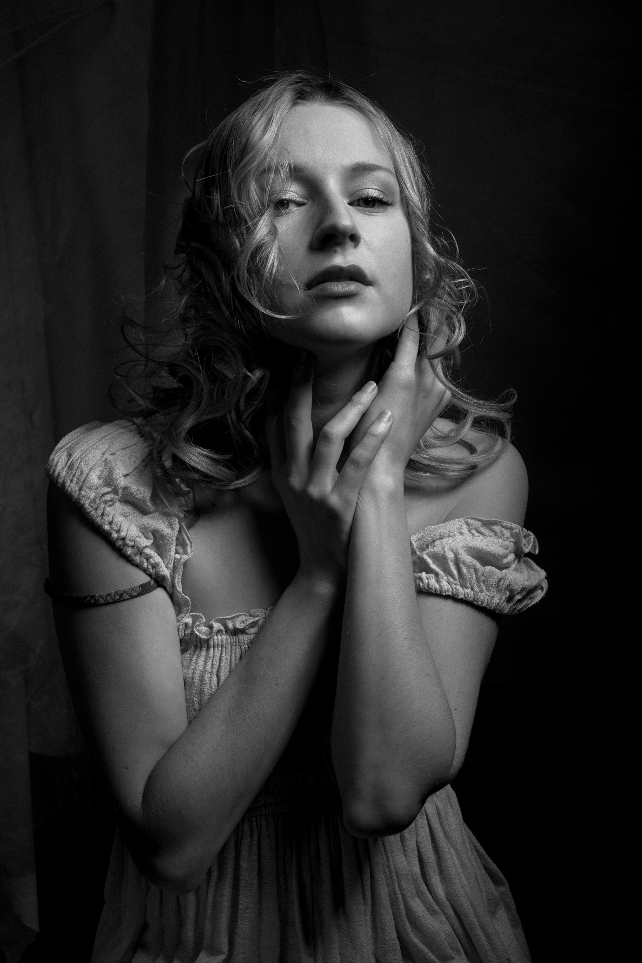 Ольга Медынич - актриса Молодежного театра на Фонтанке, в проекте VanDerQ «Актеры театра и кино»